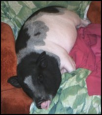 Questa è una foto del mio adorato Maialino Pancia a Tazza (O Vietnamita) il cui nome è Speck. In questa foto, Speck dorme sulla poltrona di casa mia :) Originariamente, questa foto era stata pubblicata solo nel sito Paciokland Blog, di cui sono l'autore.